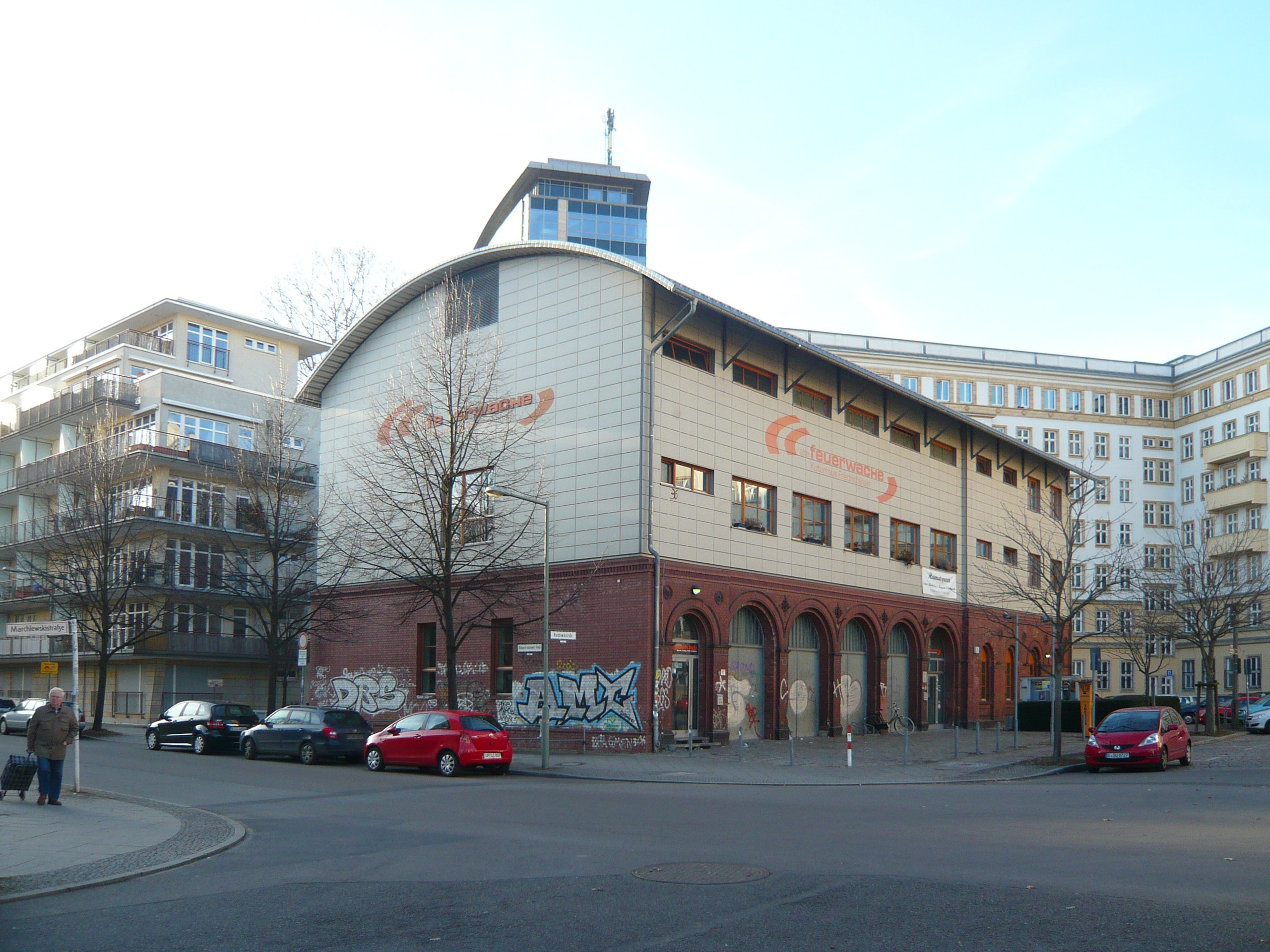 Berlin-Friedrichshain, Marchlewskistraße; "alte feuerwache"